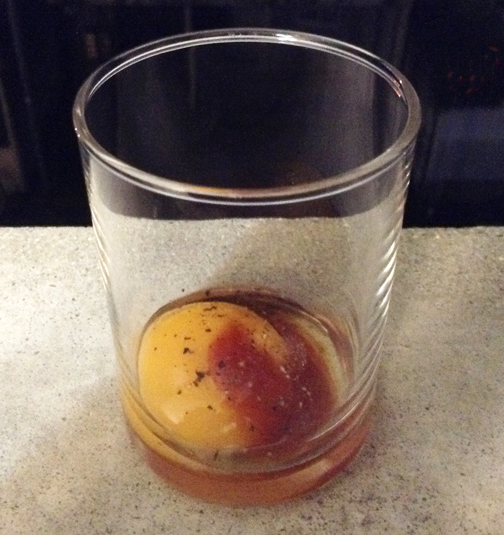 卵黄 1個、ウスターソース、トマトケチャップ、ビネガー、胡椒。コクを出すために少しダシを入れてるけどね。ちゃんと Cowboy Bebop でやってたように卵の殻で卵黄を分けたよ。